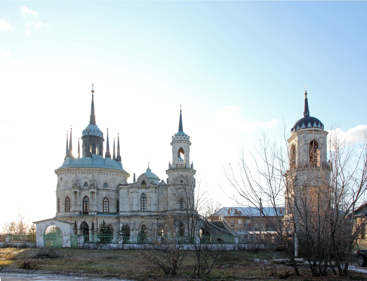 Церковь Владимирской (иконы) Божией Матери (Москва и Московская область, Жуковский, село Быково)